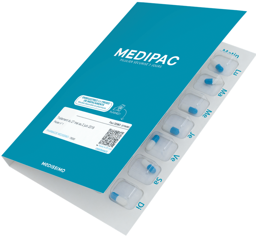 Pilulier Medipac à usage unique de la société Medissimo